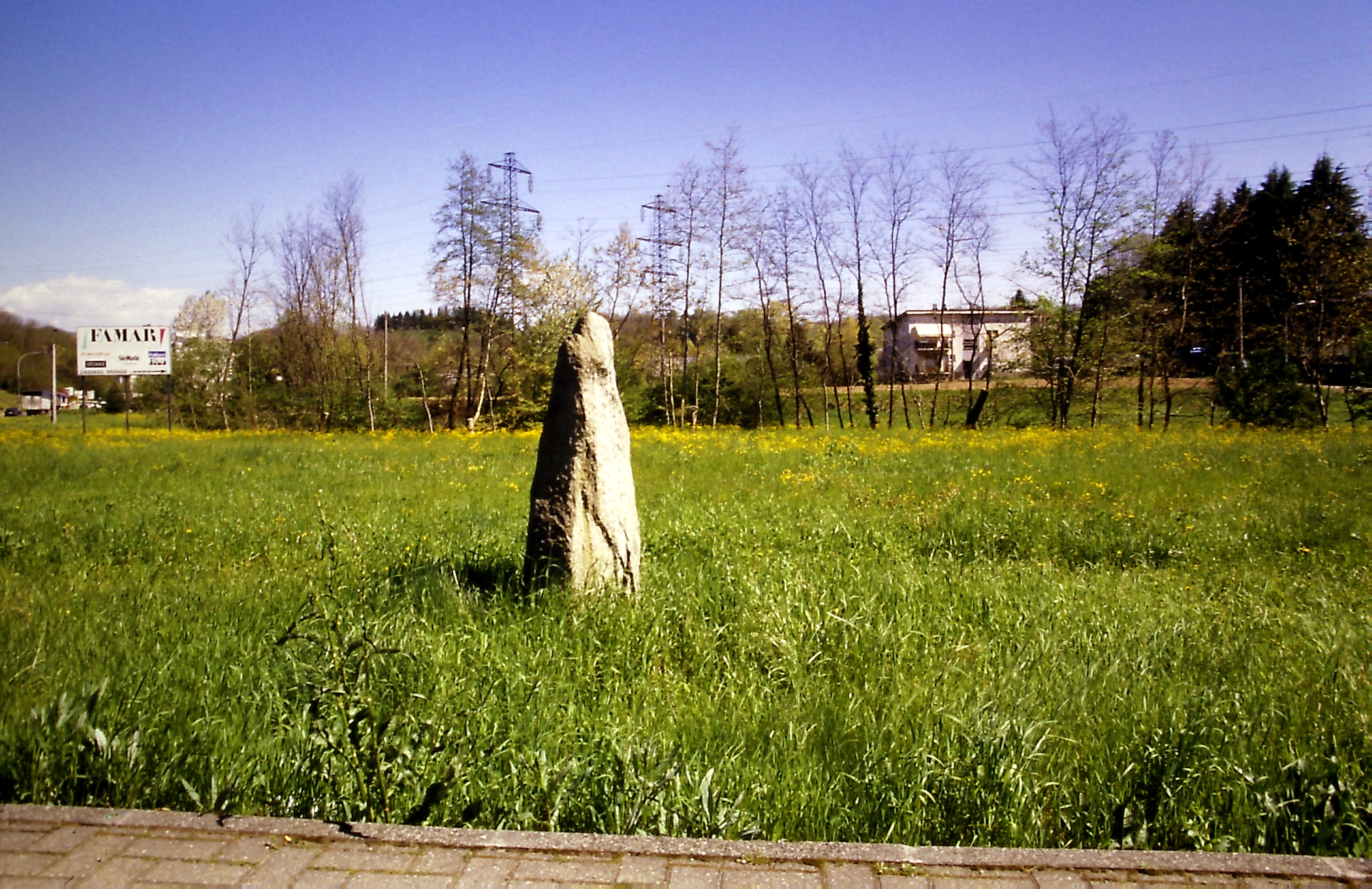 Questa antica pietra è sparita nel 2007. Il comune di Bulciago si è attivato e ha ritrovato il reperto. Da allora nessuno si è preoccupato di riportarlo nella sua sede naturale e quindi il menhir non esiste più.